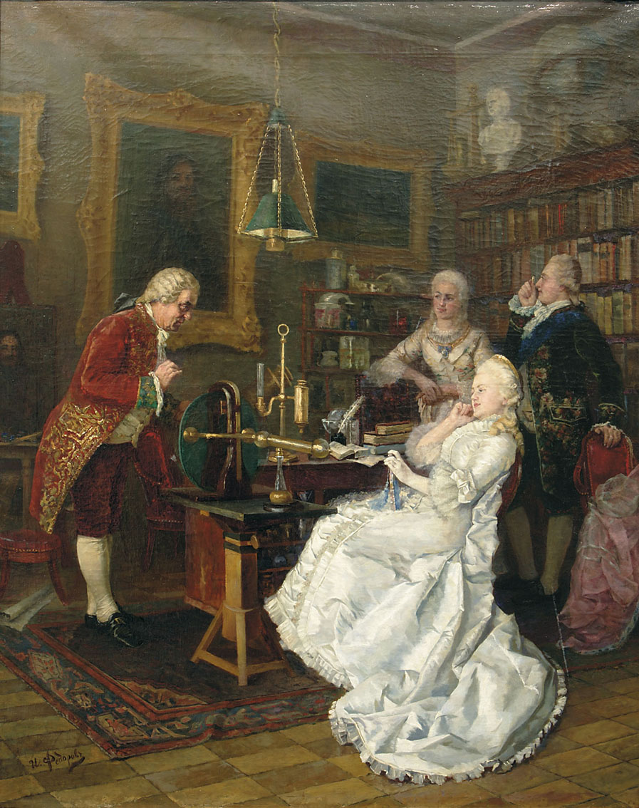 Императрица Екатерина II у М.В. Ломоносова